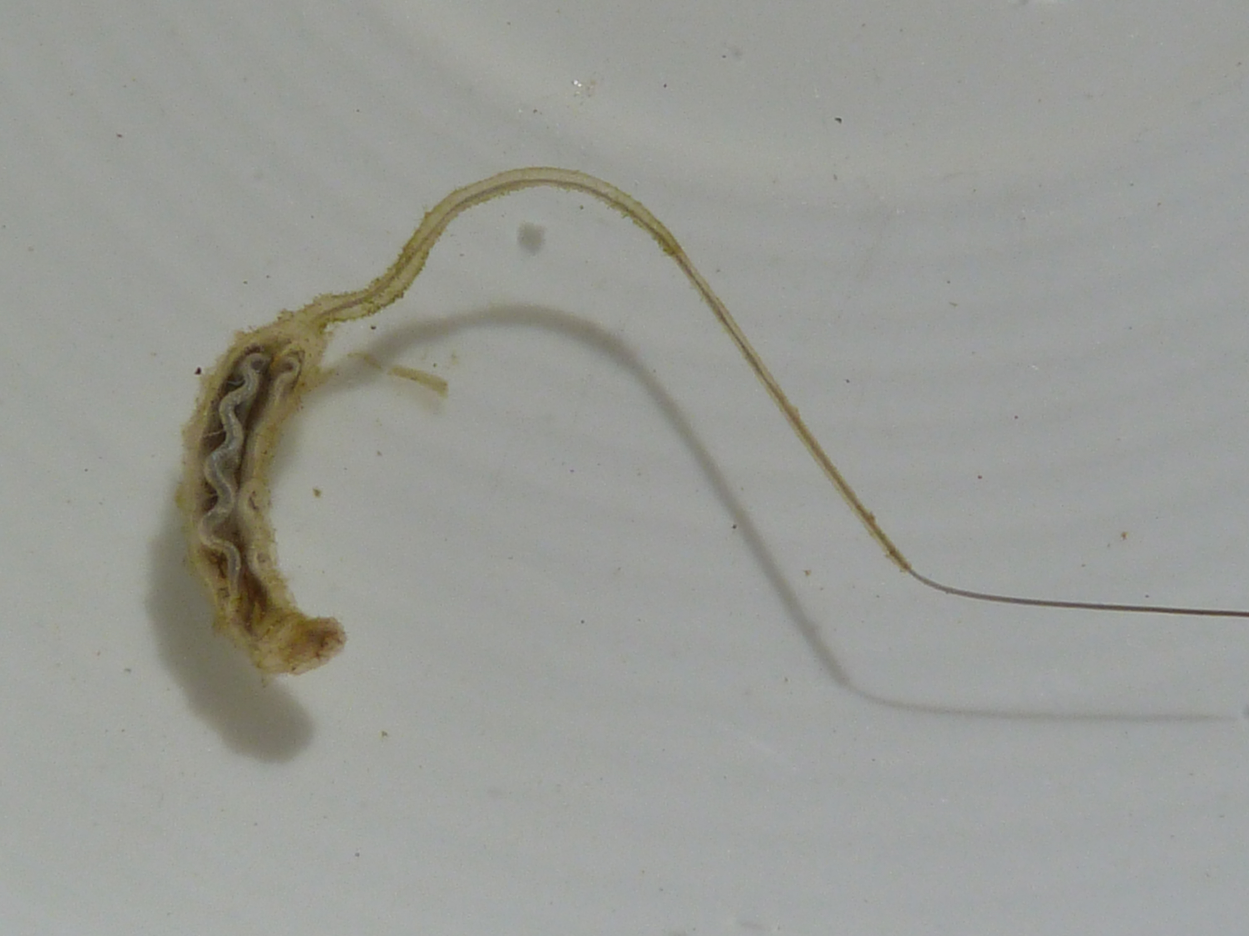 Rattenschwanzlarve evtl. der Mistbiene, zur Bestimmung auf WP:RBIO/B